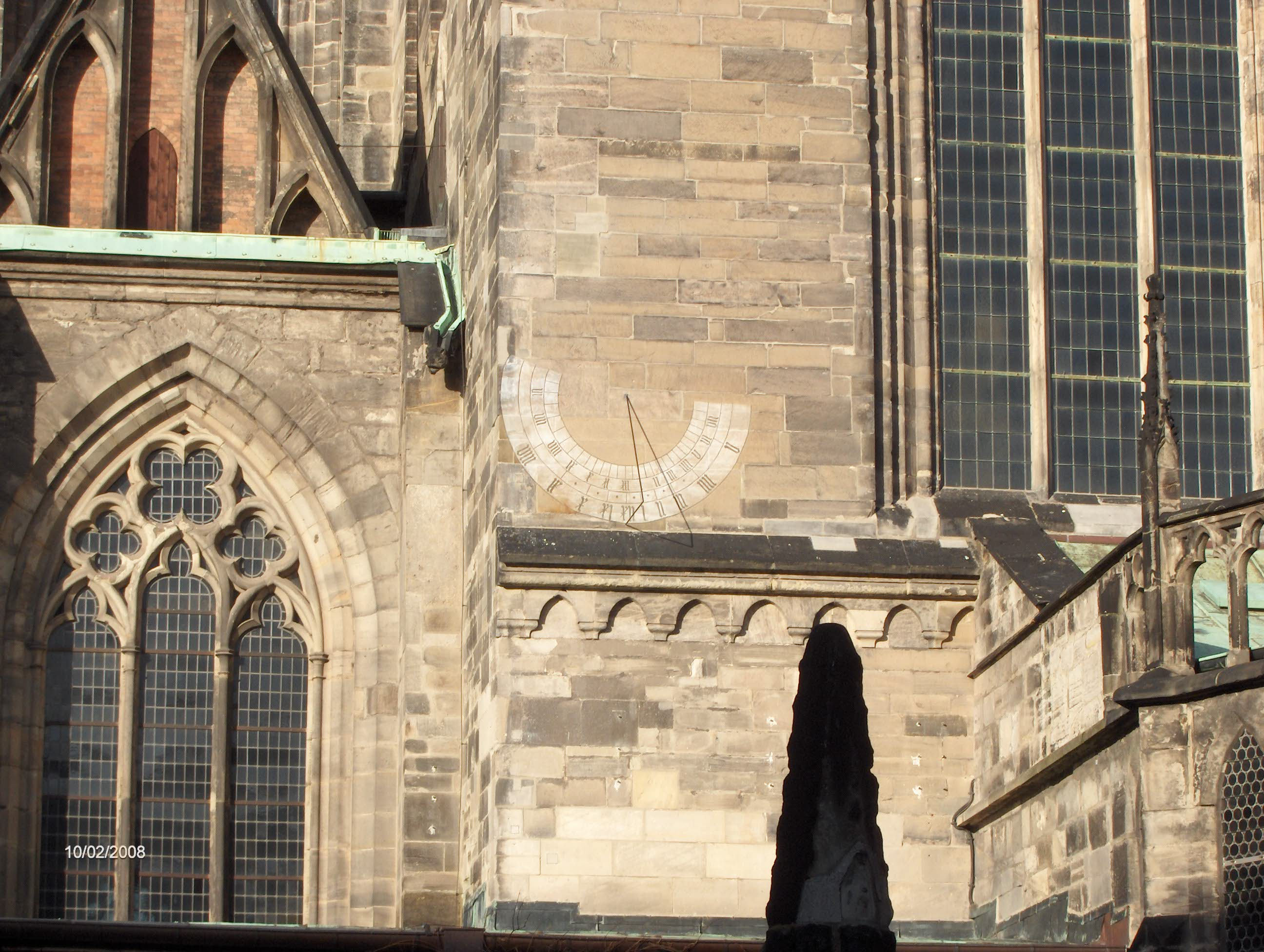 Sonnenuhr im Innenhof des Doms zu Magdeburg